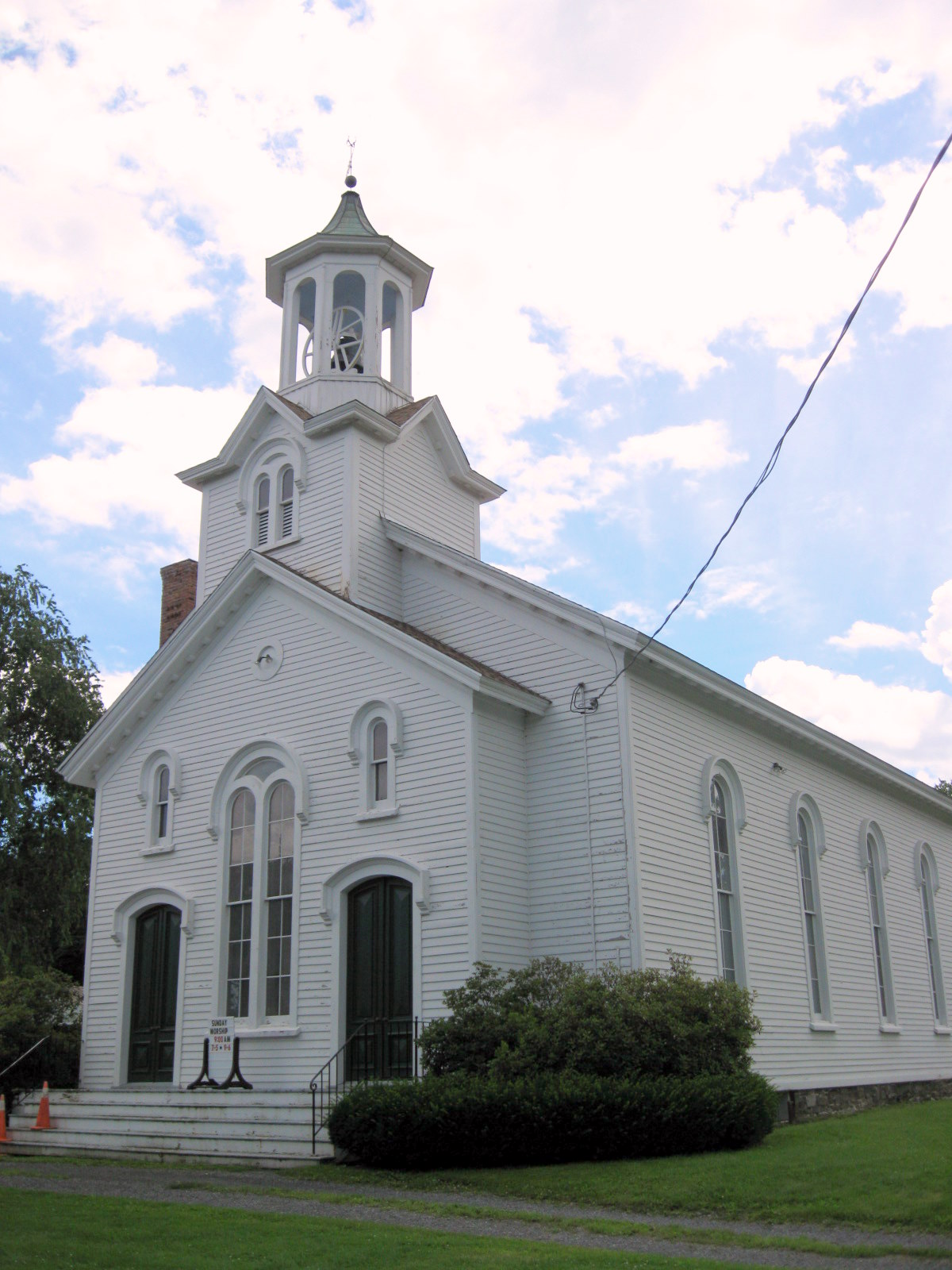 Muitzeskill Church - Schodack, New York